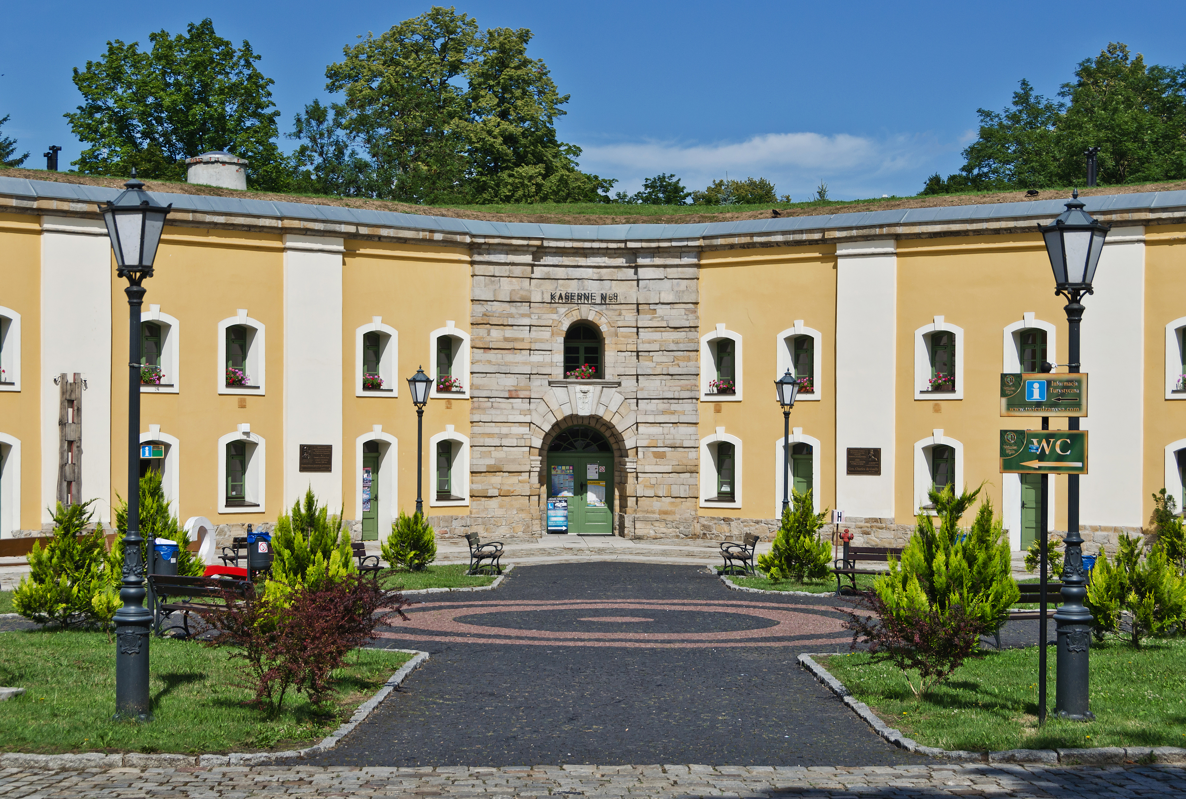 Nysa, bastion św. Jadwigi, 1643, 1742-1776